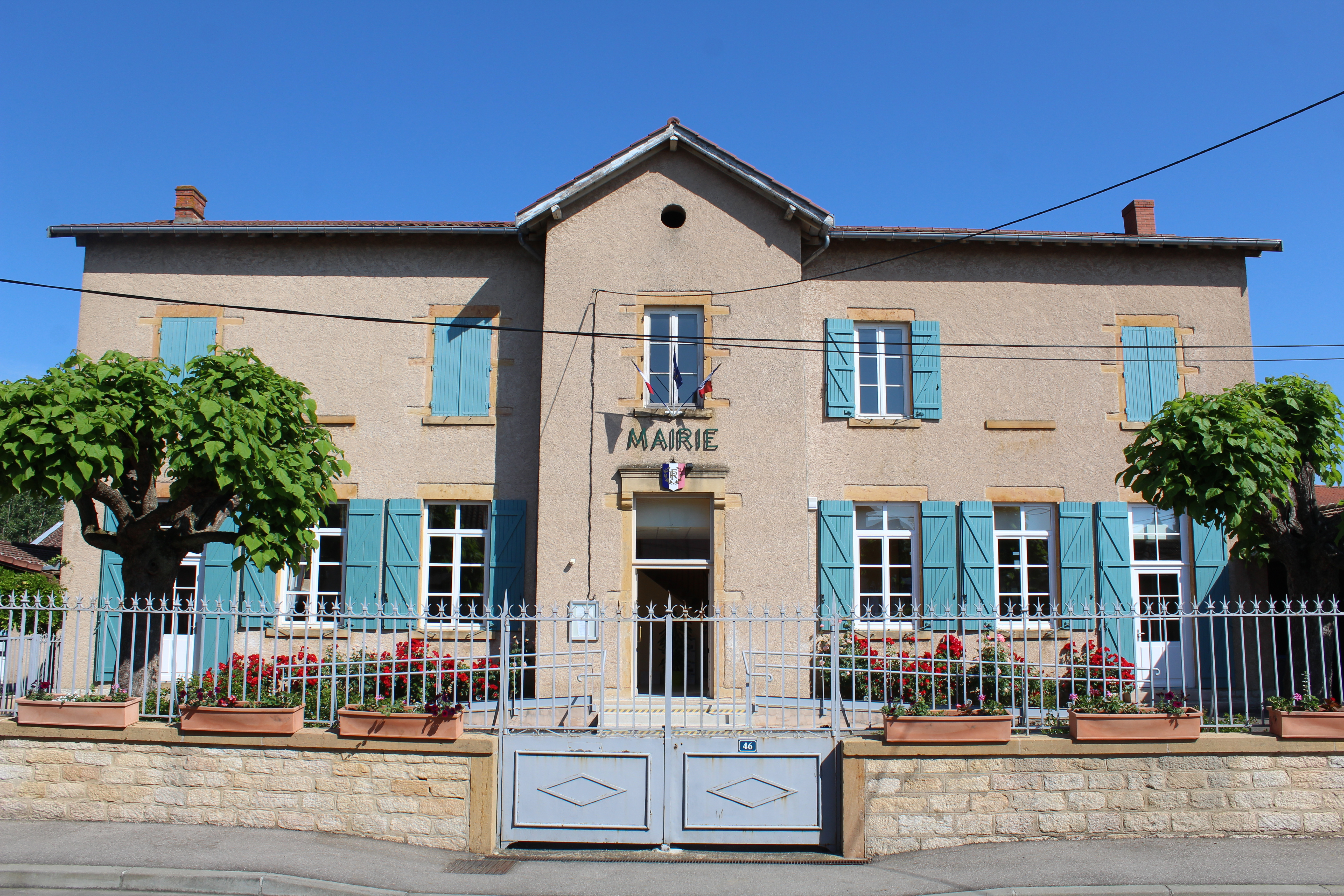 Mairie de Messimy-sur-Saône.